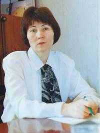 Зайцева Татьяна Ивановна